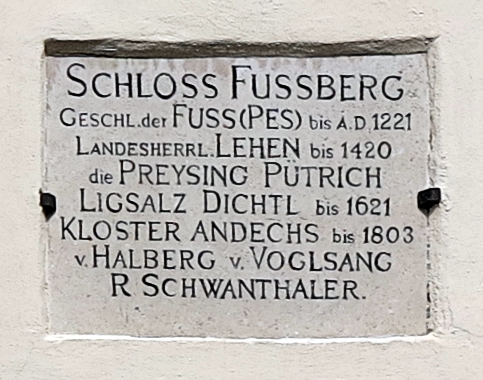 Deutschland, Bayern, Oberbayern, Landkreis Starnberg, Gauting, Schloss Fußberg, Infotafel über dem Haupteingang